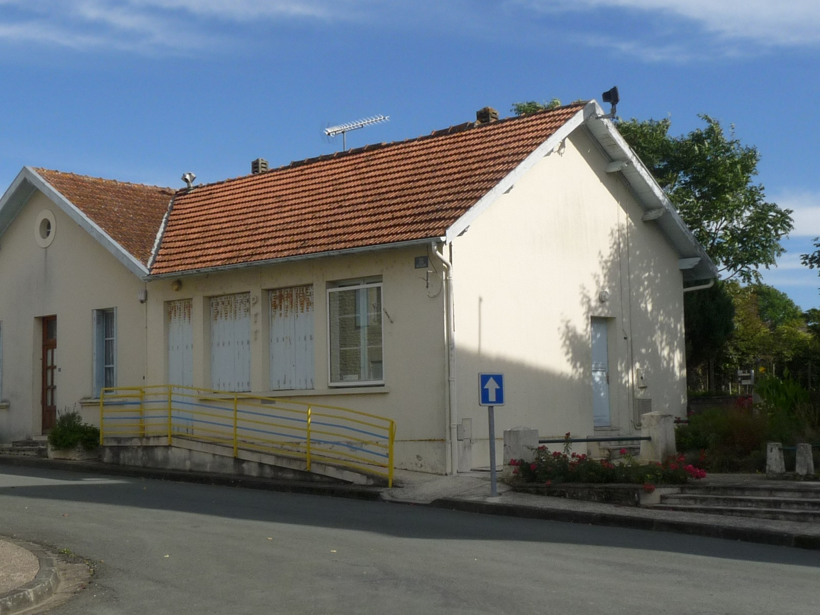 Salle des fêtes, Tugéras, Charente-Maritime, France